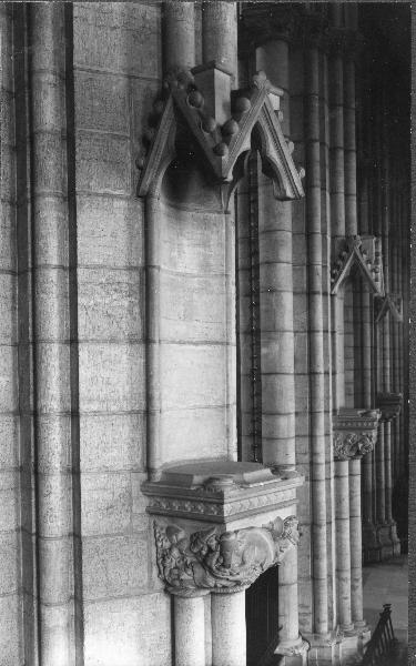 Interiör från södra sidoskeppet, pelare B 13, kragsten med baldakin. Kategori: (02) Interiörer, detaljerInteriör från södra sidoskeppet, pelare B 13, kragsten med baldakin.